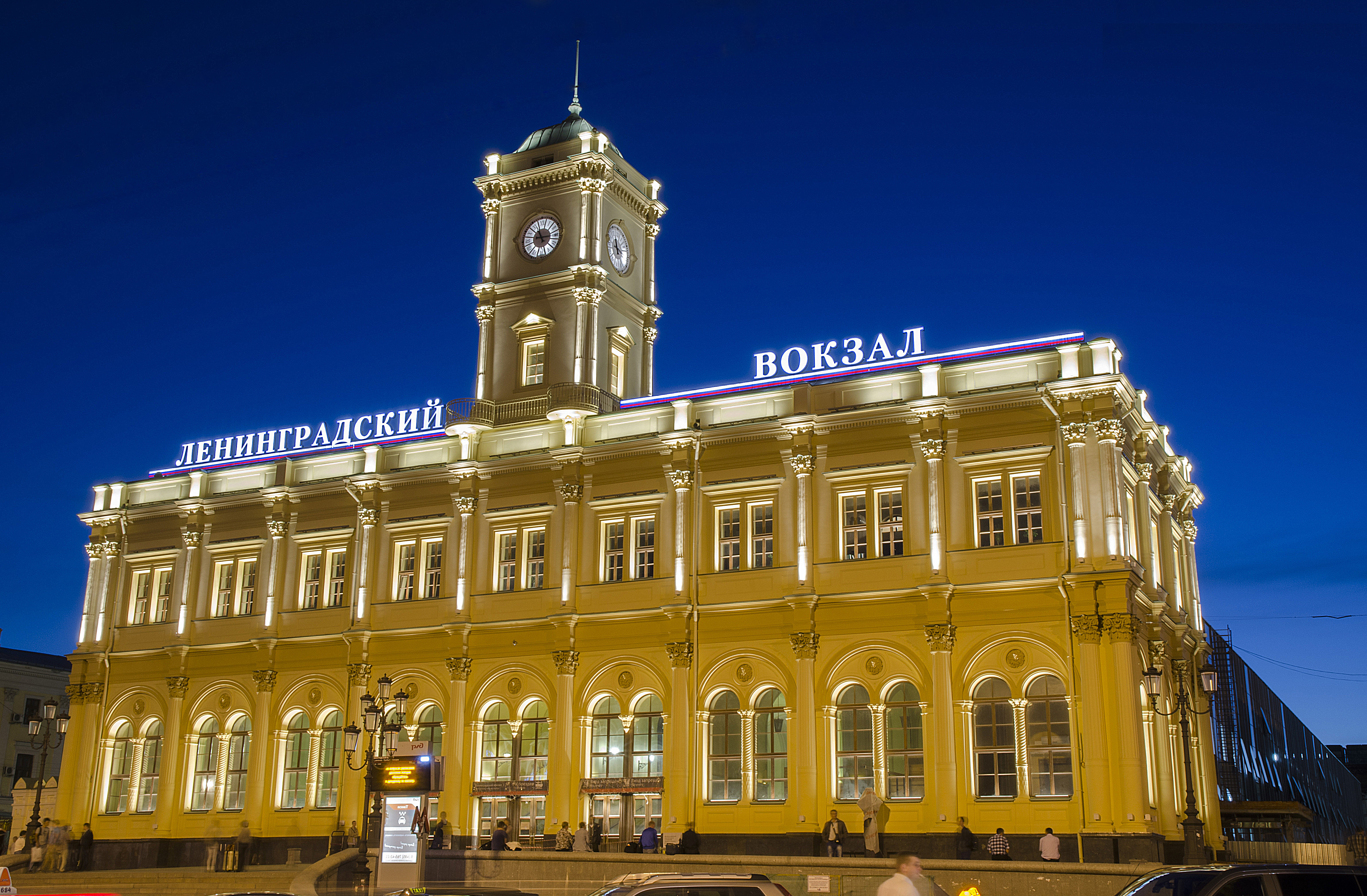 Вокзал Николаевский (Ленинградский) (Москва и Московская область, Москва, Комсомольская площадь, 1-а, 3)